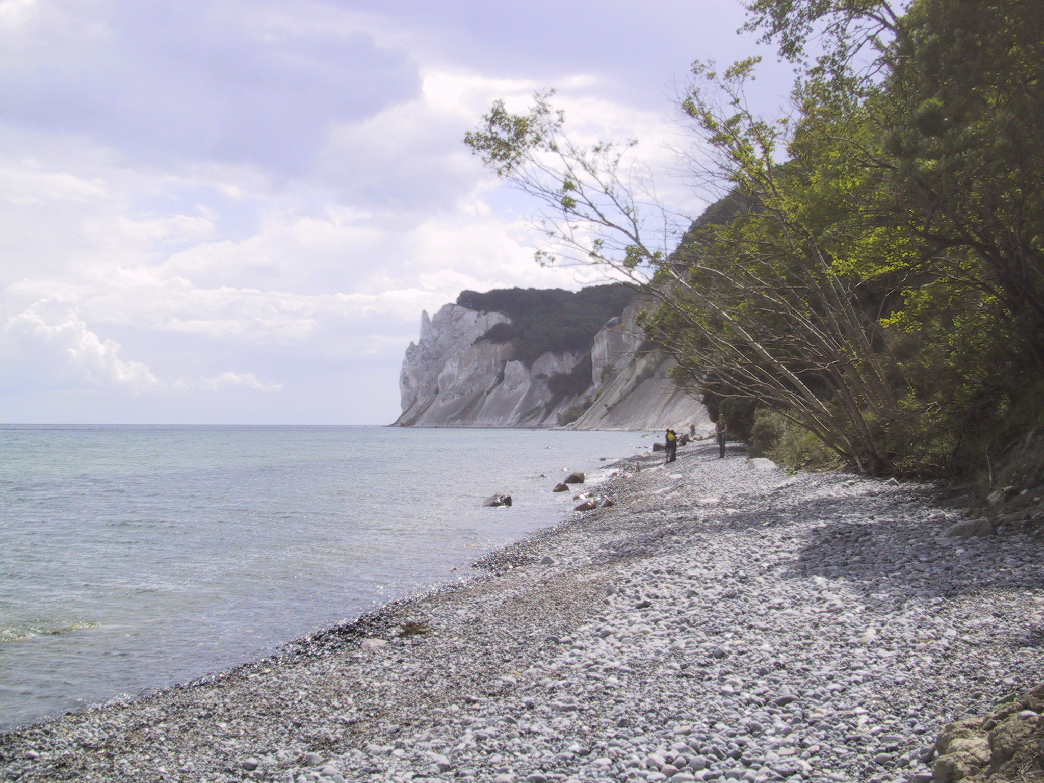 Ein weiterer Blick zu den Kreidefelsen Møns vom Strand aus